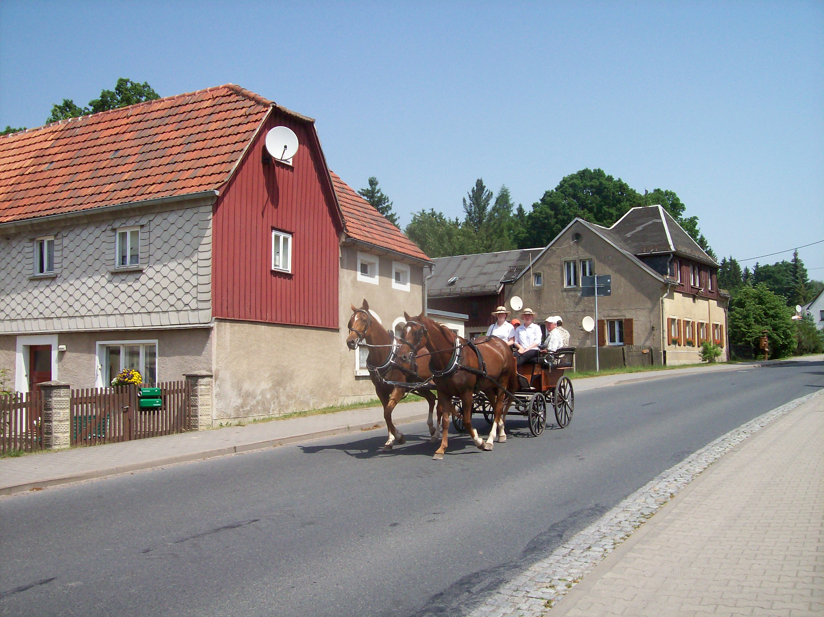 Alte Schmiede und Chausseehaus (rechts) in Grillenburg